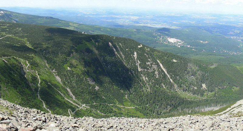 Aussicht von der Schneekoppe zum Melzergrund Melzergrund (Kocioł Łomniczki, wörtlich Łomniczka-Kessel) mit deutlich sichtbarem Flusslauf der Kleinen Lomnitz (Łomniczka), Riesengebirge (Karkonosze), Niederschlesien, Polen.